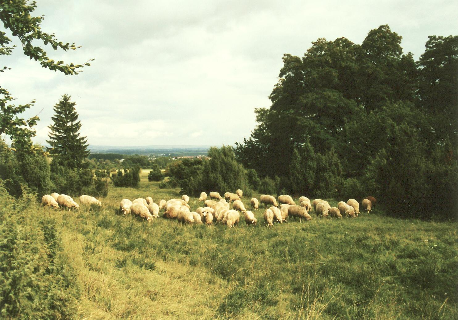 FND Wacholdertrift, eine Wacholderheide bei Oberdorla, mit weidenden Schafen und Fernblick ins Mühlhäuser Becken bis zu den Fahnerschen Höhen und zur Hainleite.